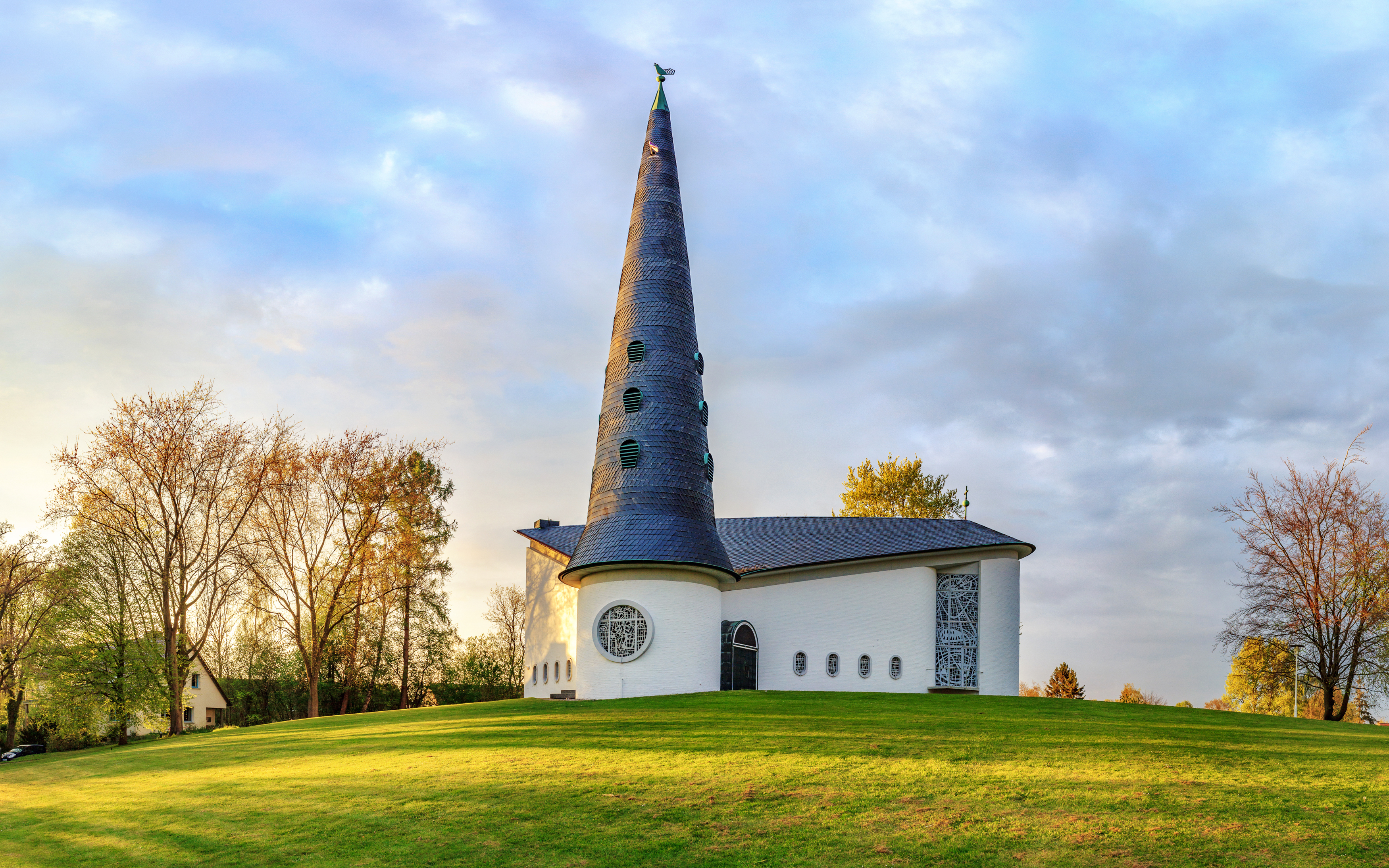 Die Thomaskirche in Schulensee einem Ortsteil von Molfsee in der Nähe von Kiel.